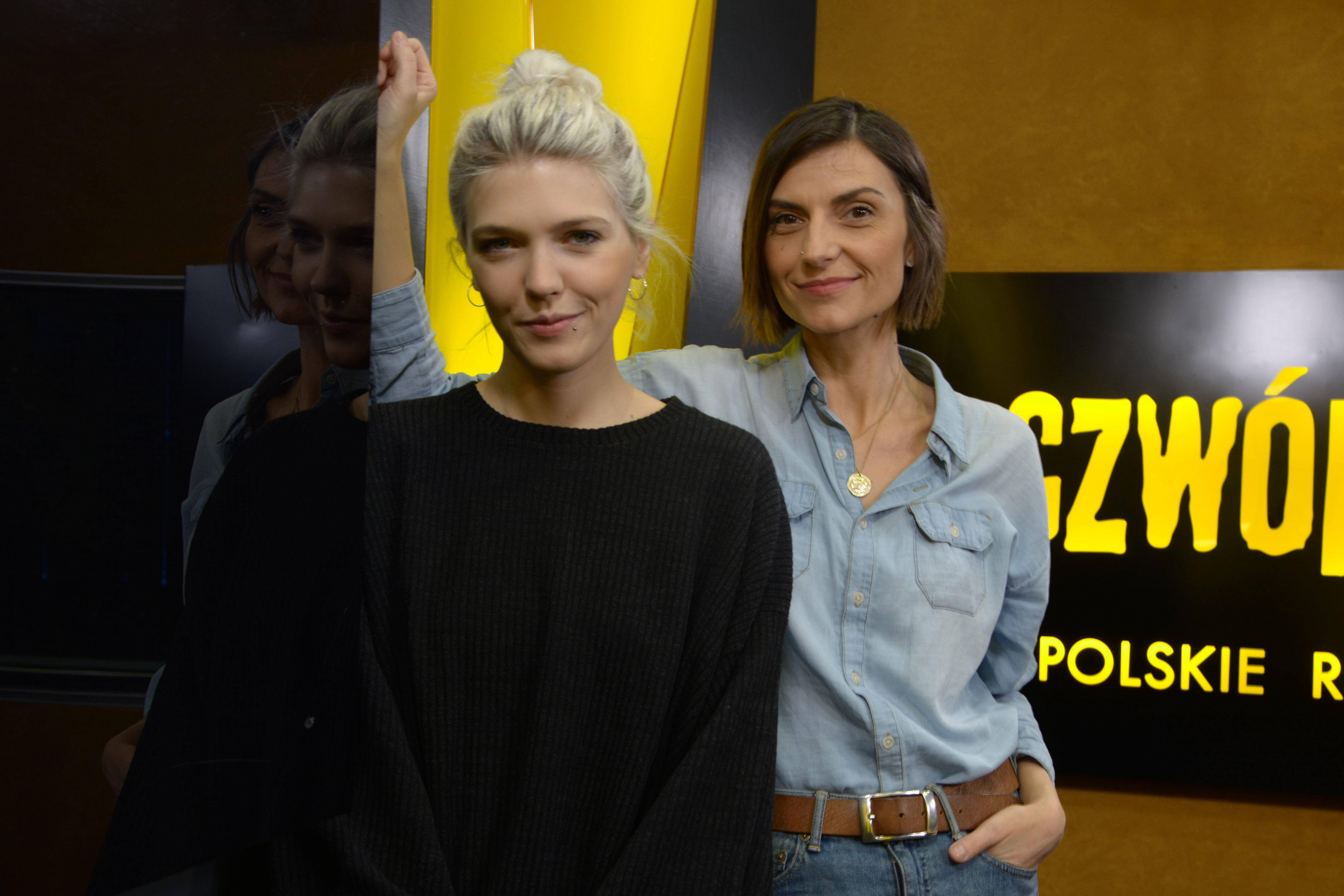 Daria Zawiałow z Ulą Kaczyńską- dziennikarką Czwórki Polskiego Radia.